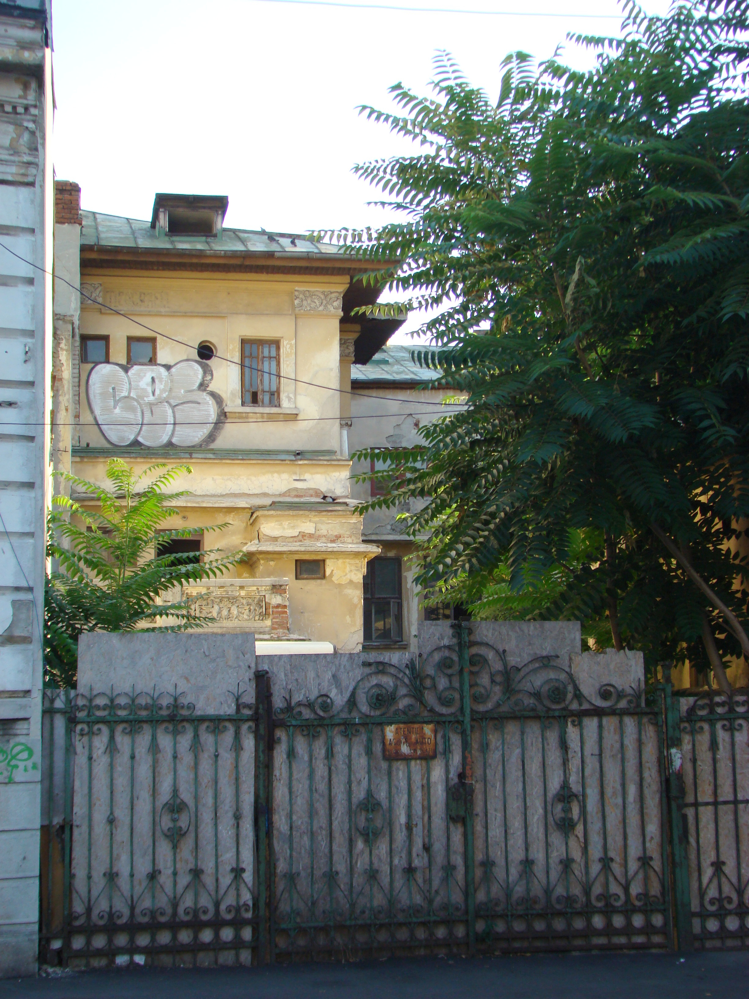 Casă monument istoric, str. Constantin Budișteanu, nr.8